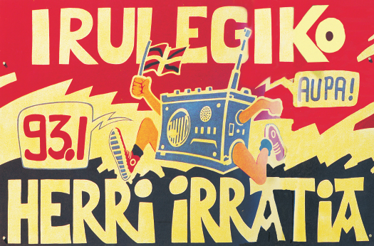 Irulegiko Herri Irratia.